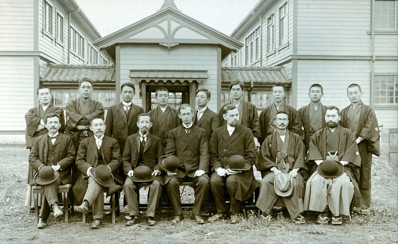 九州学院神学部教授陣と神学生 後列左より渡辺潔、亀山万里、村上二郎、川瀬徳太郎、松本学明、高橋信太郎、三浦豕、今井良雄、本田伝喜、前列左より鷲山晴誠、遠山参良、奥太一郎、ブラウン、ウィンテル、高橋長七郎、秋元茂雄